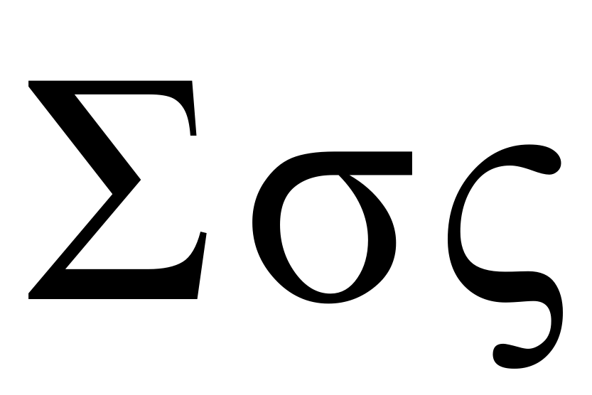 greek letter sigma